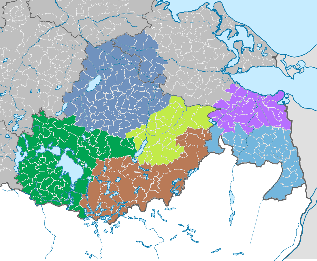 Karte der Amtsgerichtsbezirke im Landgerichtsbezirk Neubrandenburg vor der am 6. Oktober 2014 in Kraft getretenen Gerichtsstrukturreform Amtsgericht Waren (Müritz) Amtsgericht Demmin Amtsgericht Neustrelitz Amtsgericht Neubrandenburg Amtsgericht Ueckermünde Amtsgericht Pasewalk